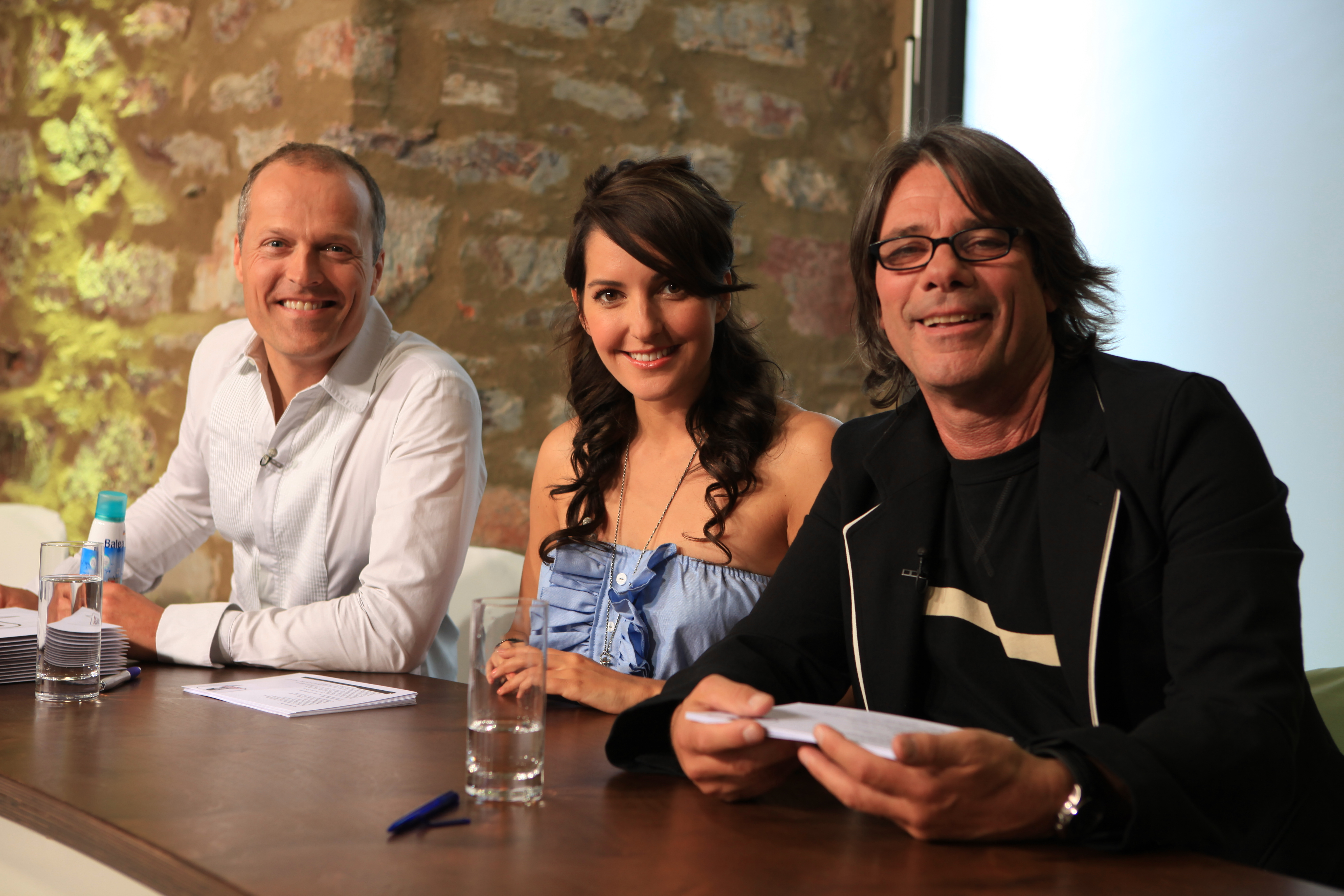 Dein Song Jury: Joja Wendt, Johanna Klum und Gunther Mende